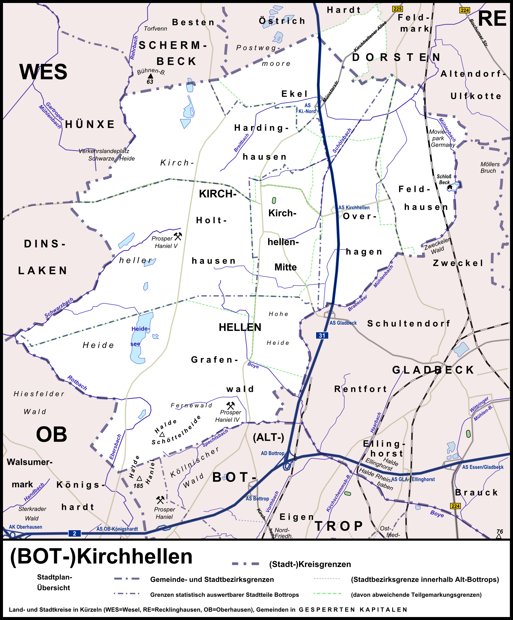 Stadtplanübersicht (Bottrop-)Kirchhellens